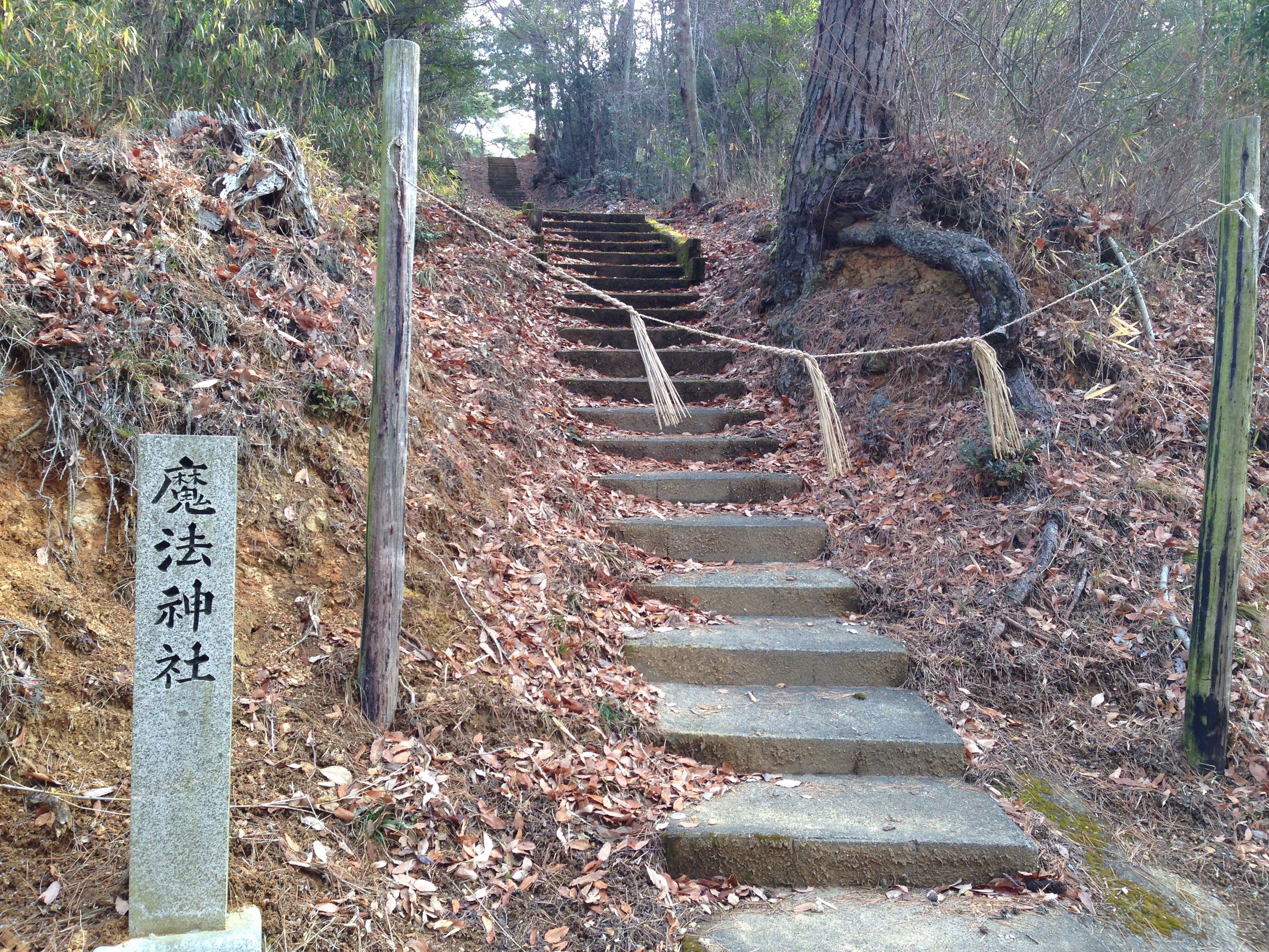 岡山県総社市槁の魔法神社。当神社に鳥居はなく、入り口に社号標のみ。